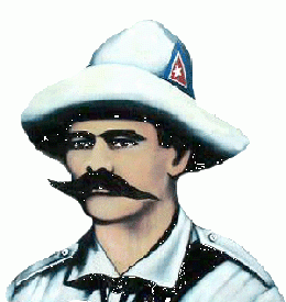 Coronel Juan Delgado